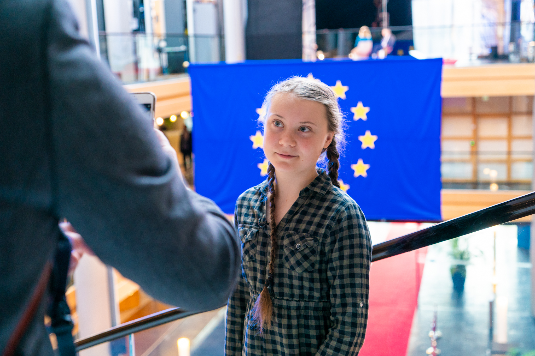 2019 france strasbourg EP EU political leader plenary session european union euroopaparlament europa parlamentet europas parlaments europe european citizens parliament europejski europeu parlamentul europos parlamentas europský europäisches parlament eurostudio európai ewropeweuropees parlaimintn aheorpa euroopan parlamente vropski parlamentil parlamento europeo parlamentti parlamentet parlement européen Parlaimint na hEorpa SONY ALPHA 9